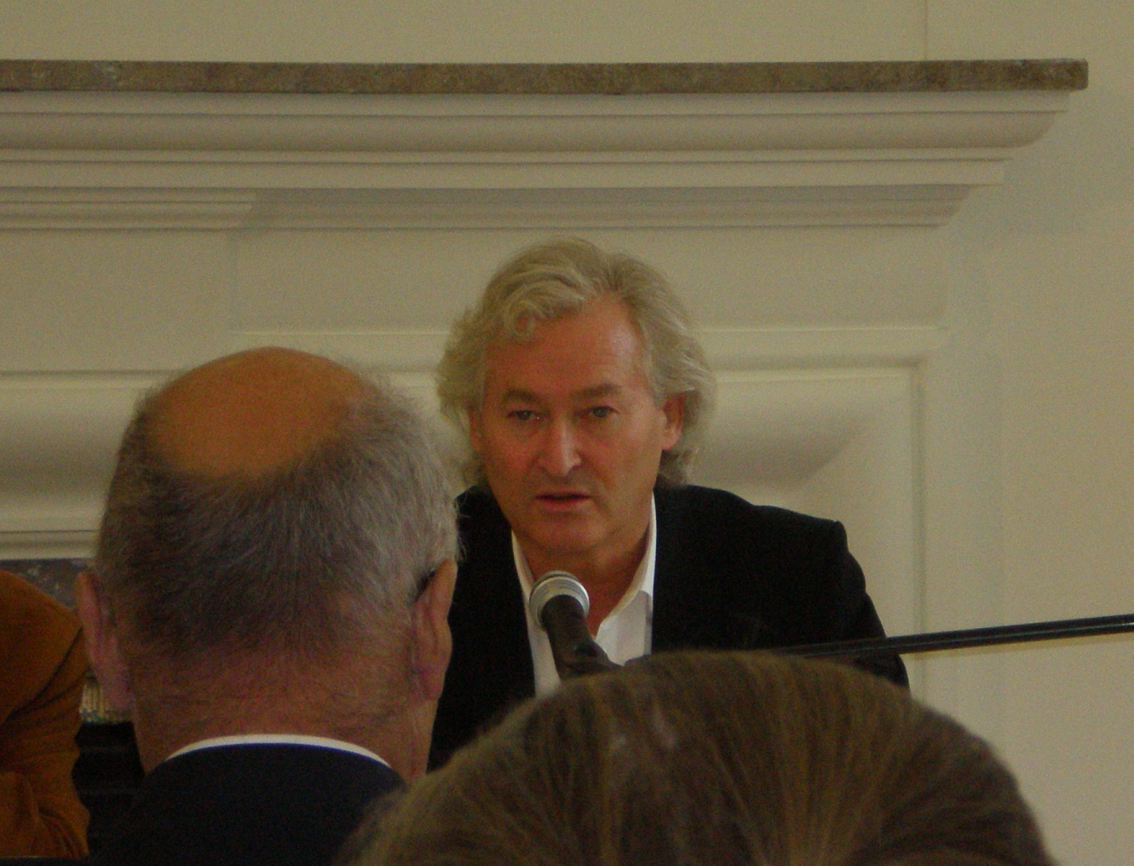 Heimo Schwilk in Potsdam 2008. Die Glatze gehört Jörg Schönbohm